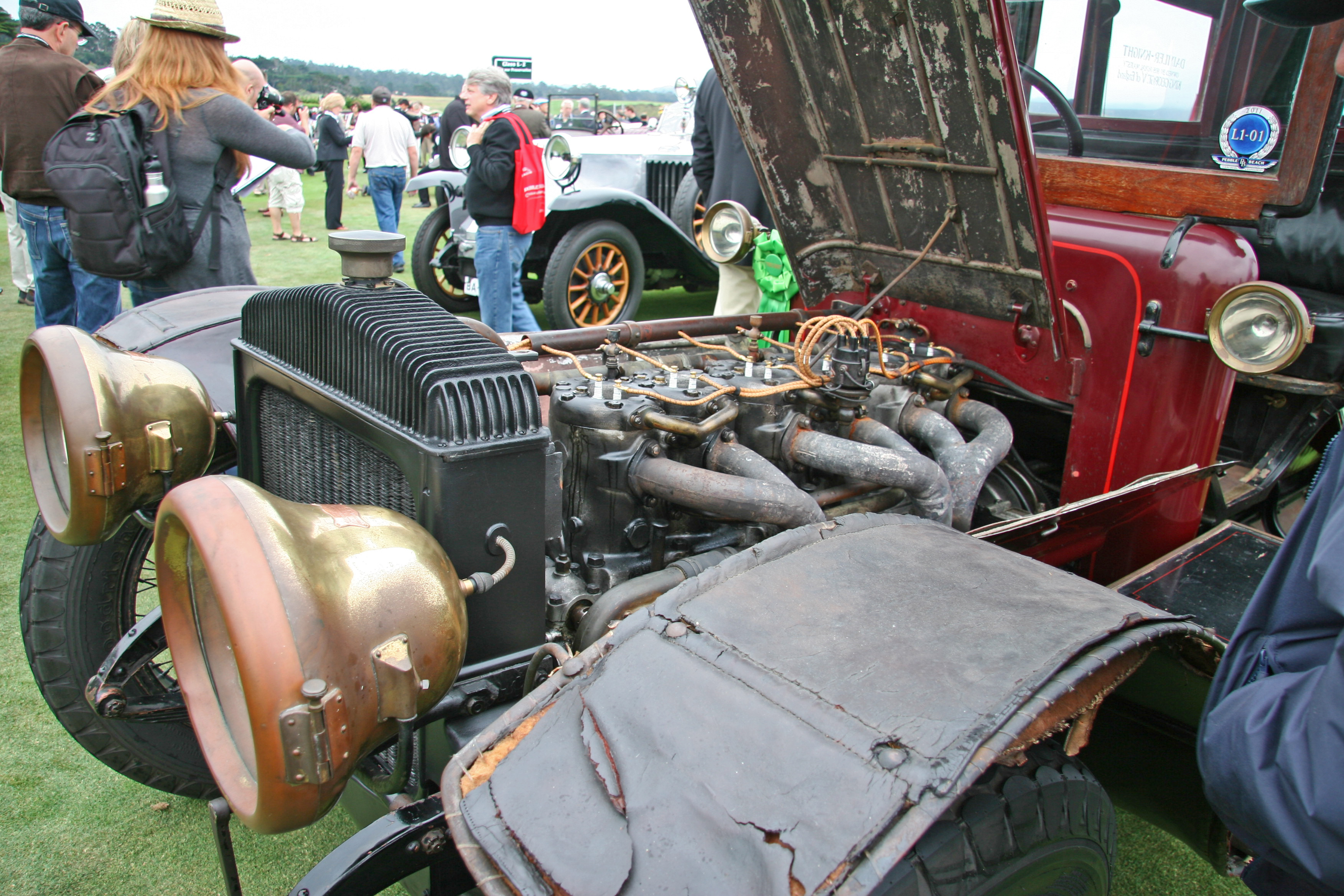 Daimler 57 HP Hooper Limousine 1910